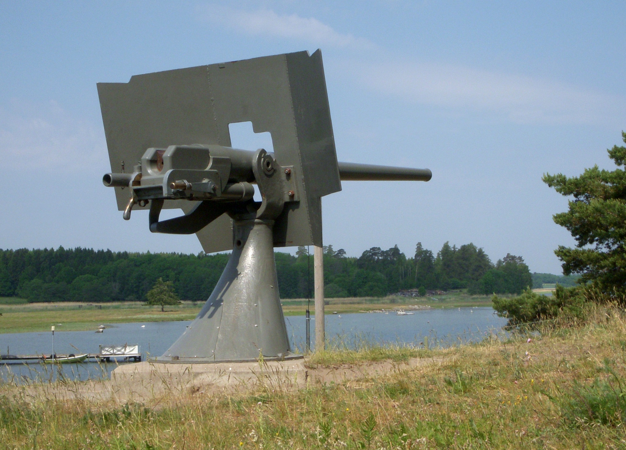 Kanon på Skansholmen (f.d. Furuholmsskansen) intill Skanssundet i Södertälje